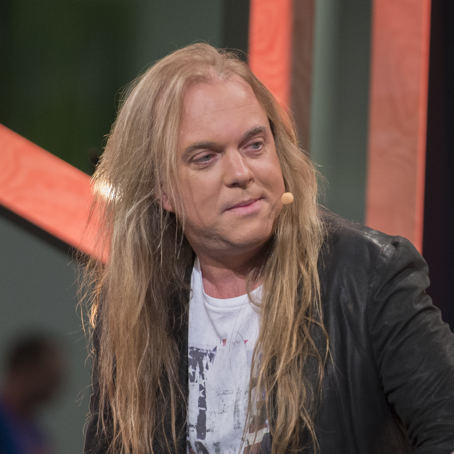 Thomas G:son intervjuas av Gina Dirawi i TV-programmet Studio Eurovision 2013.